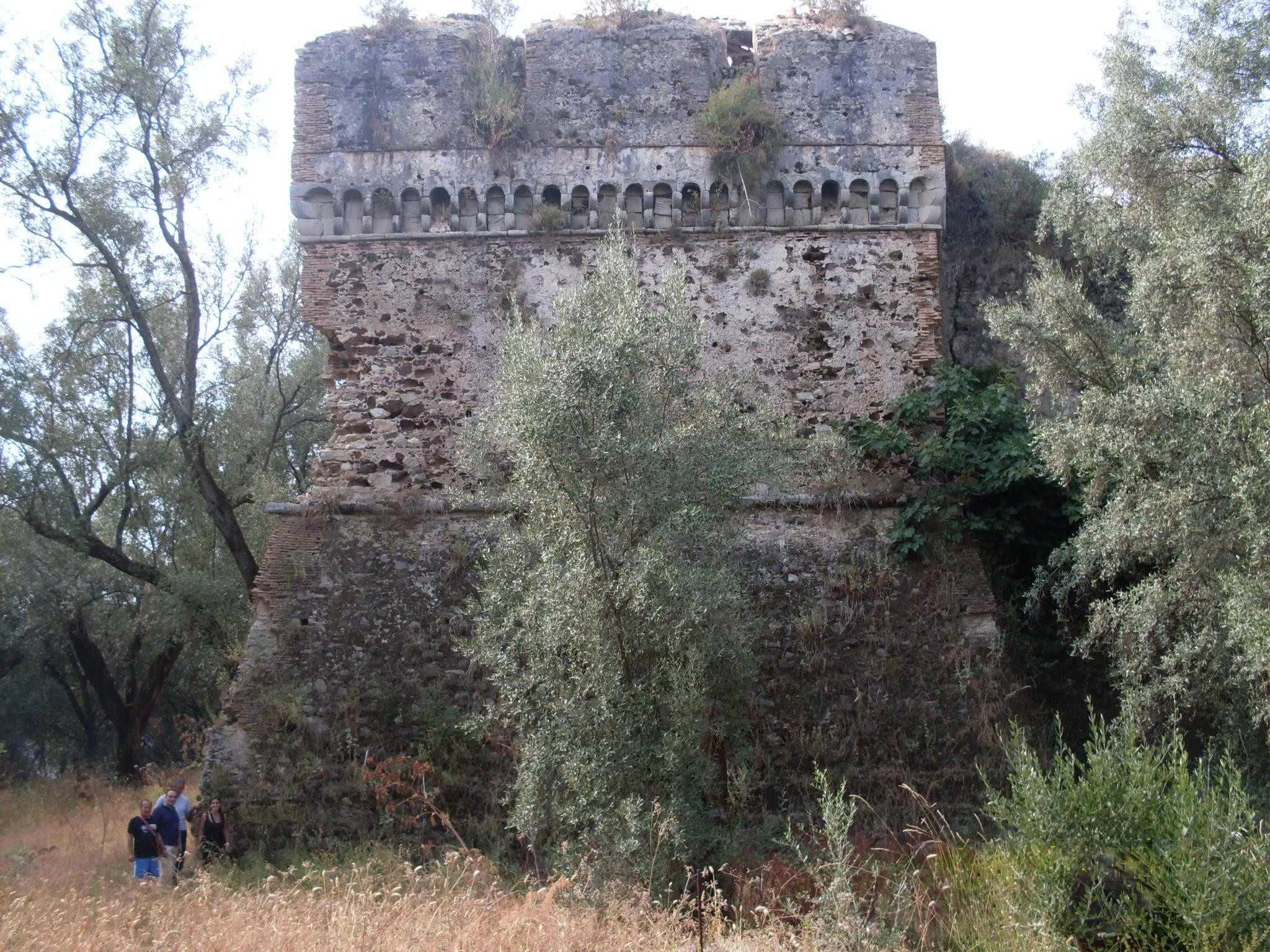 Castello di Oppido Mamertina, torre Ovest vista dall'interno della città.